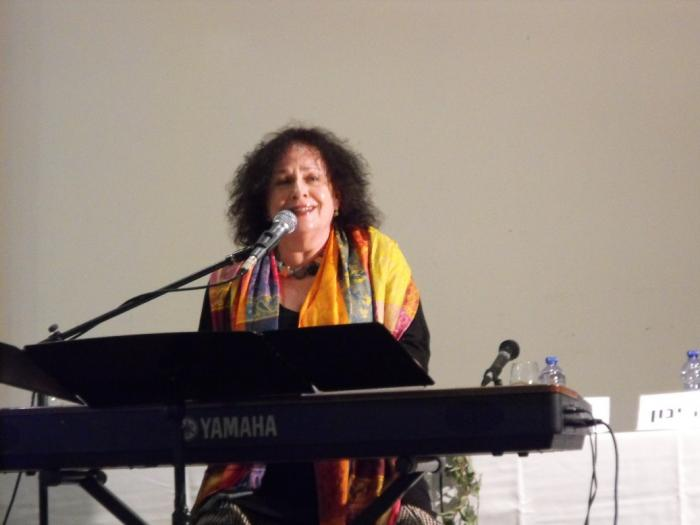 שירי משוררים.